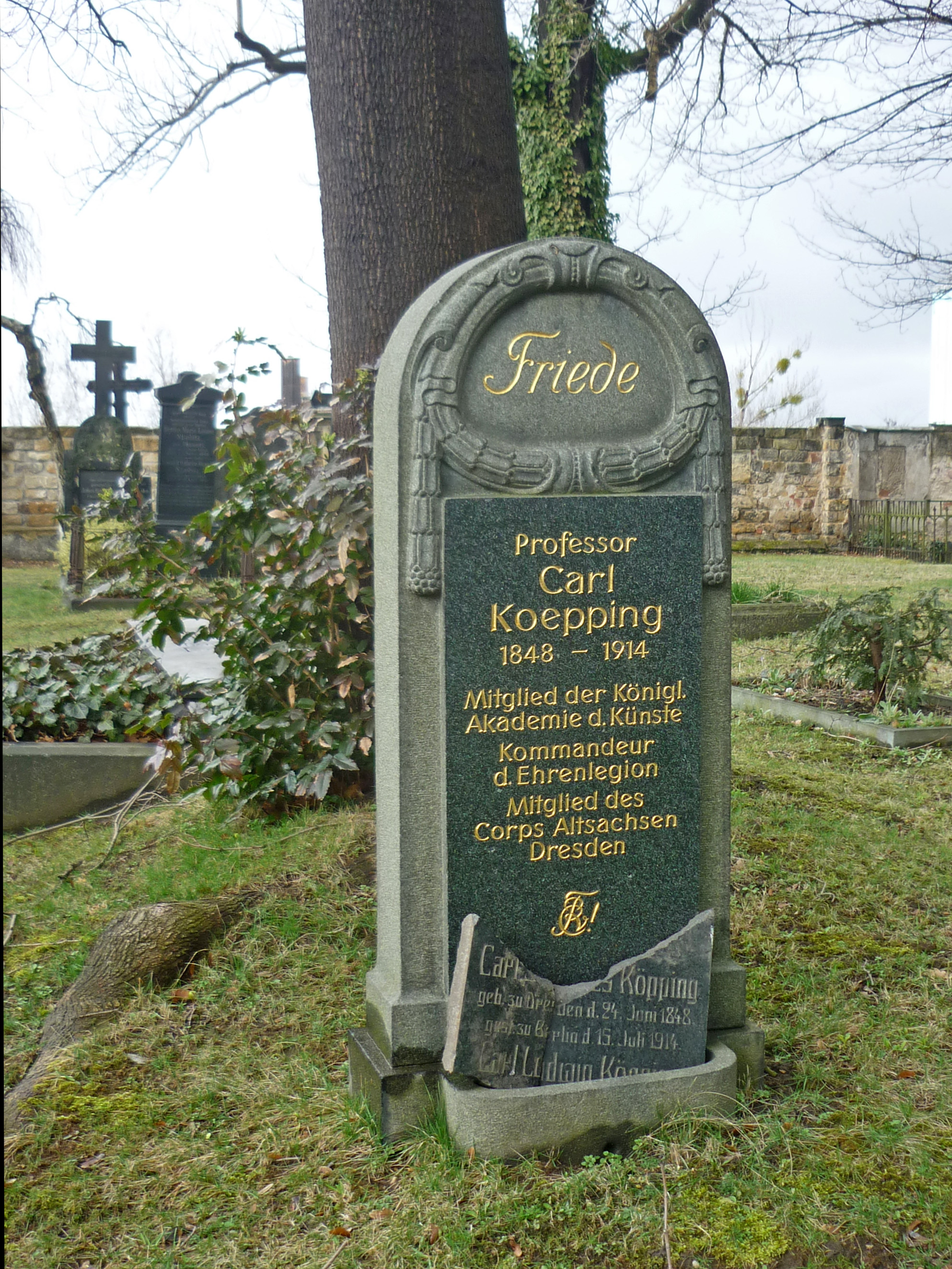 Alter Annenfriedhof in Dresden-Südvorstadt, Grab Carl Koepping (1848–1914)